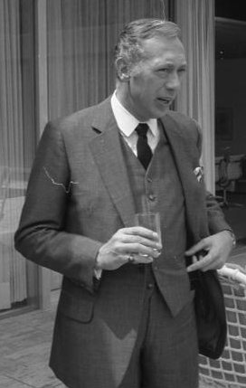 Bundeskanzler Willy Brandt empfängt Filmschauspieler Information added by Wikimedia users.